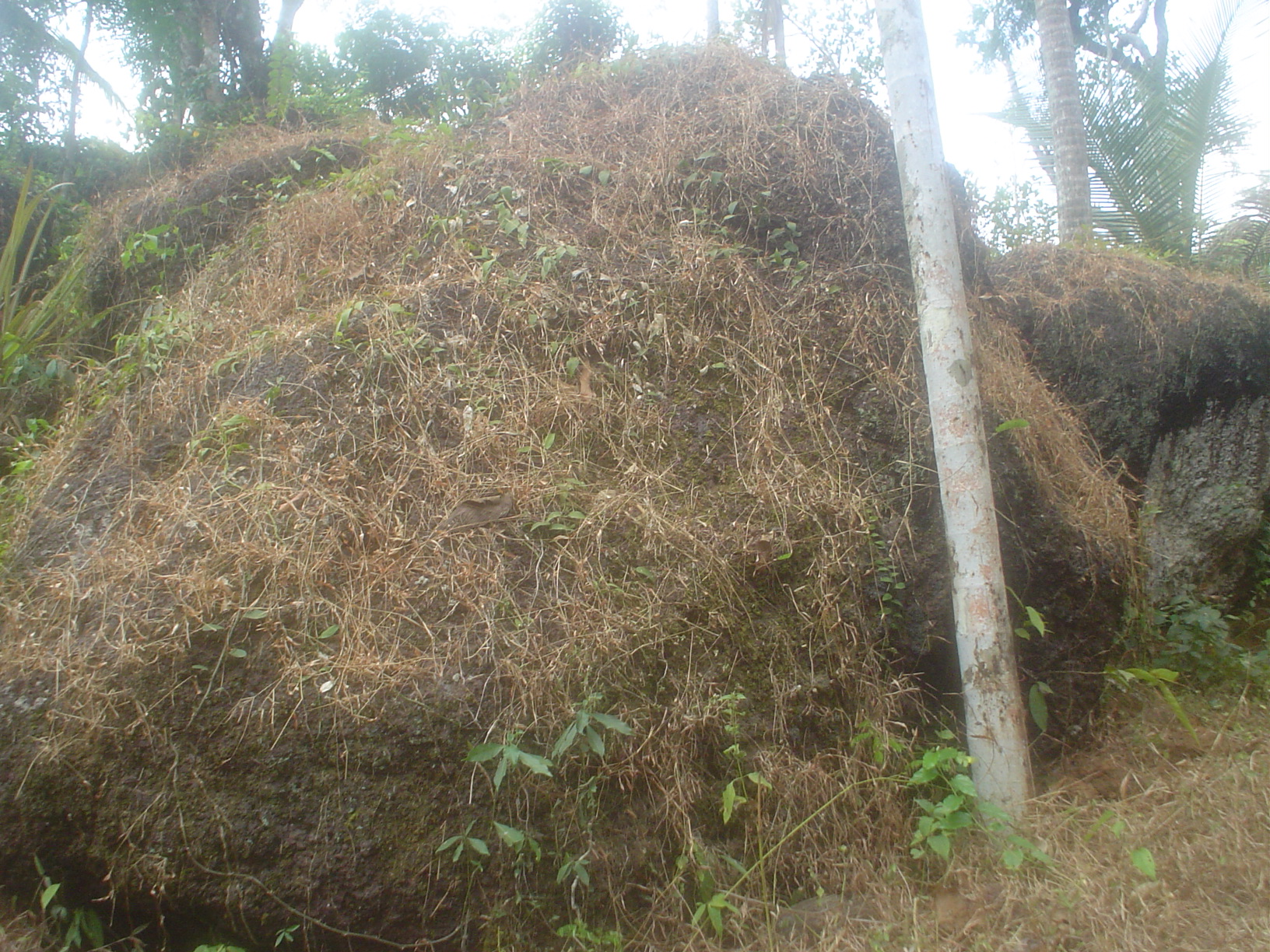 എൻറെ ഗ്രാമത്തിൽ സ്ഥിതി ചെയ്യുന്ന വലിയ പാറ ,ഫോട്ടോ:സിദ്ധീഖ് കാപ്പൻ